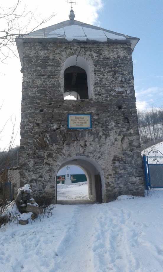 Дзвіниця у селі Рухотин